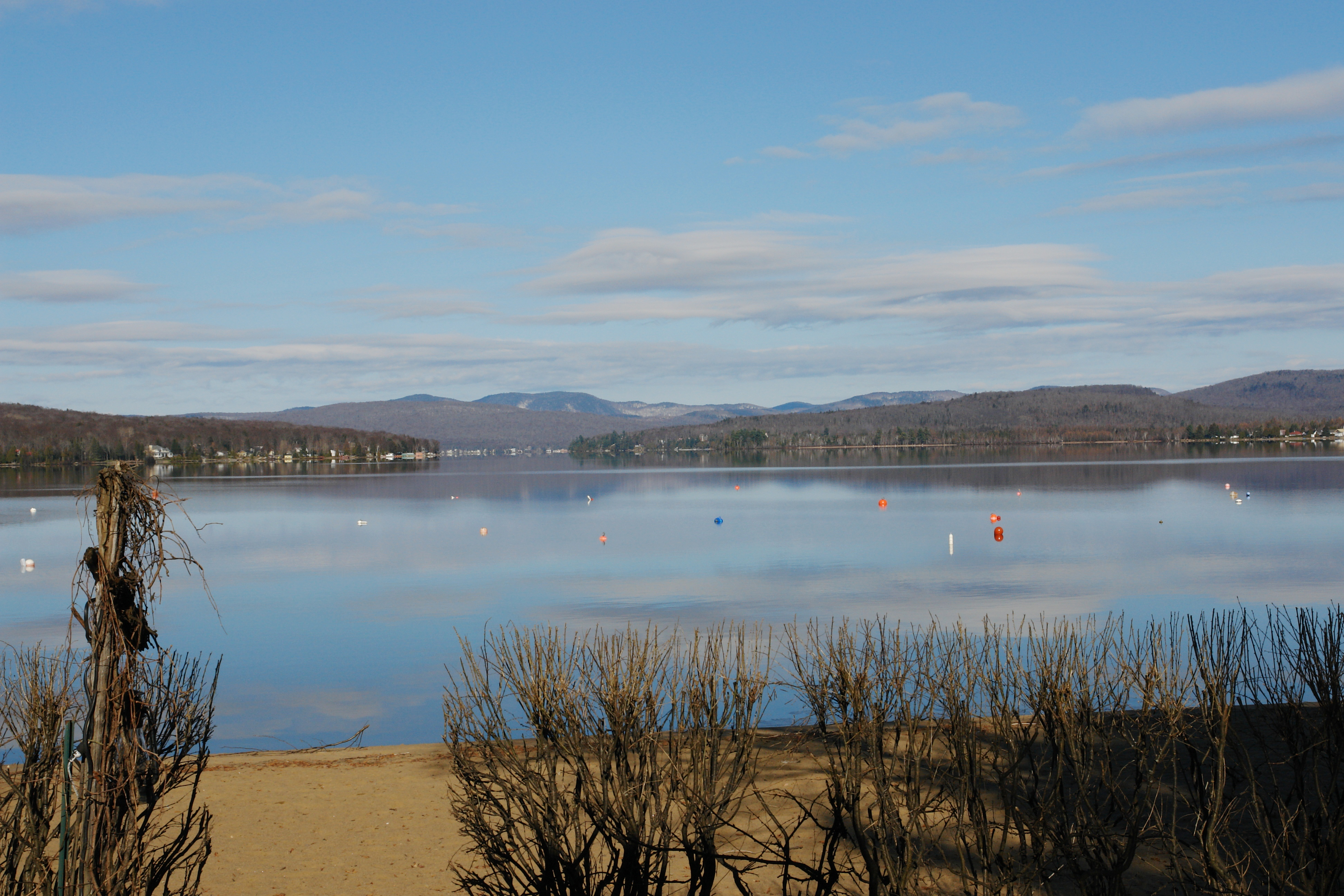 Vue du Lac St-Joseph, Fossambault, Québec, Canada Charles Têtu novembre 2006